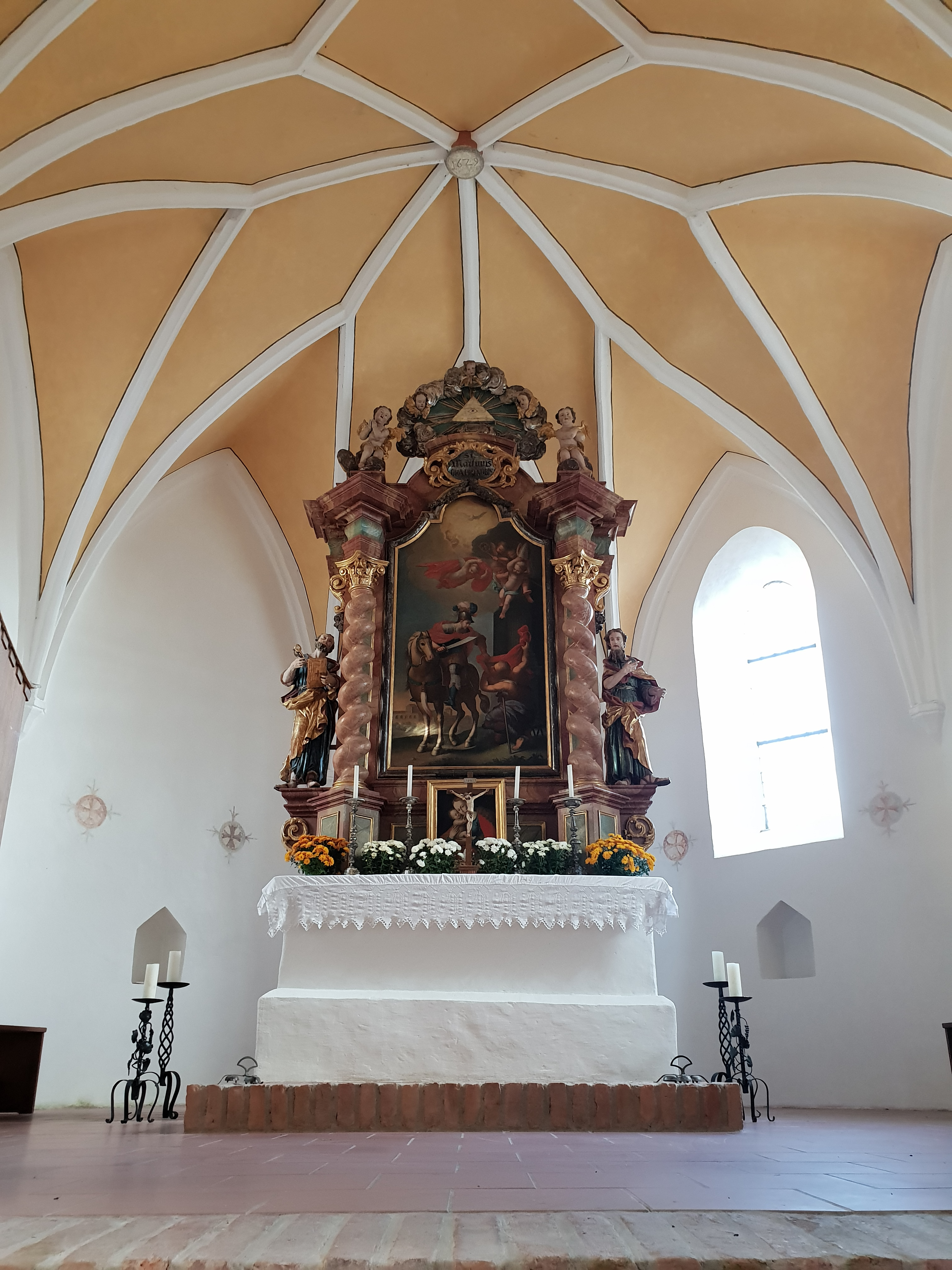 Der barocke Hochaltar der Kirche von Loinbruck aus dem Jahr 1657